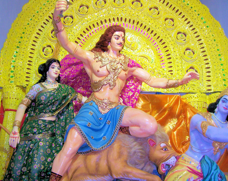 Lord Kartikeswar Idol in Orissa